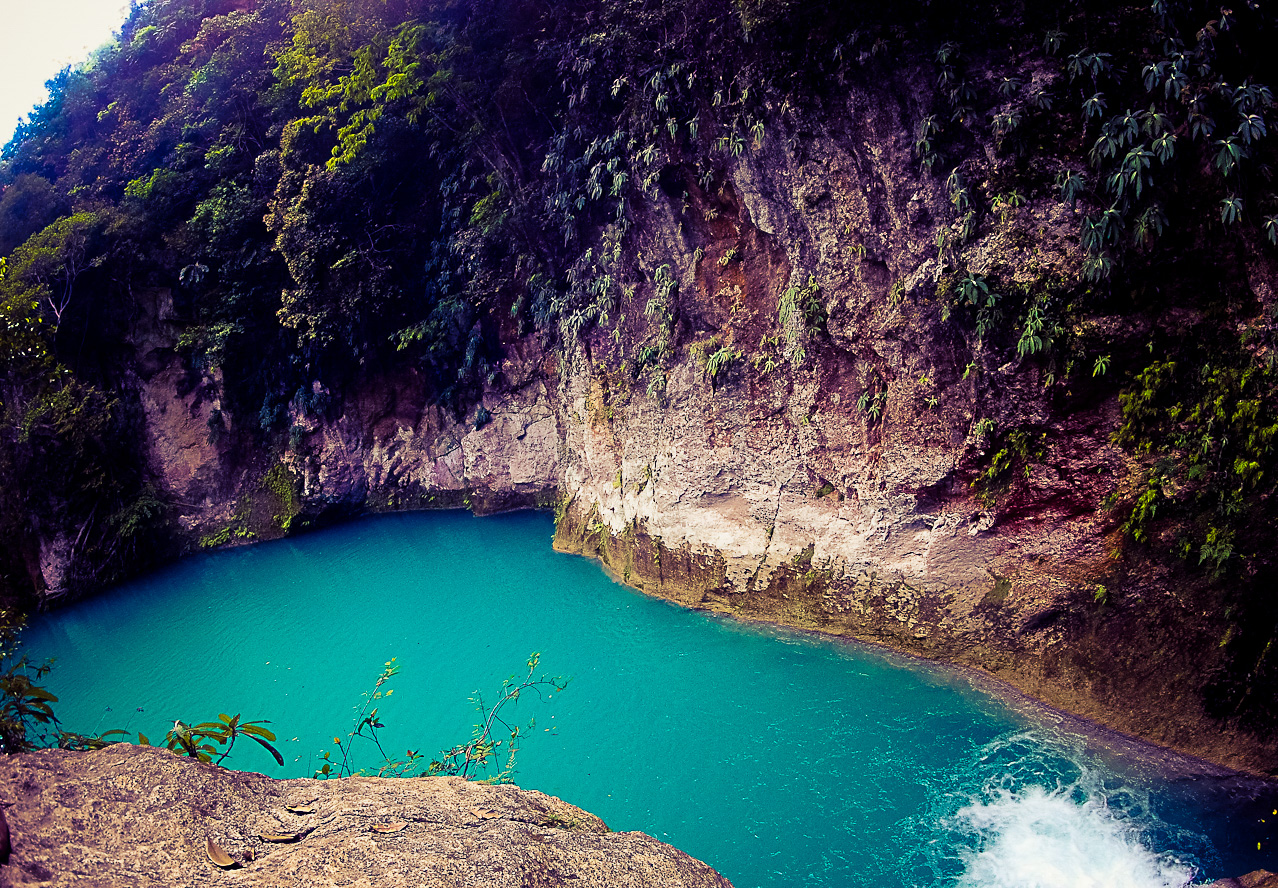 BB_web-14